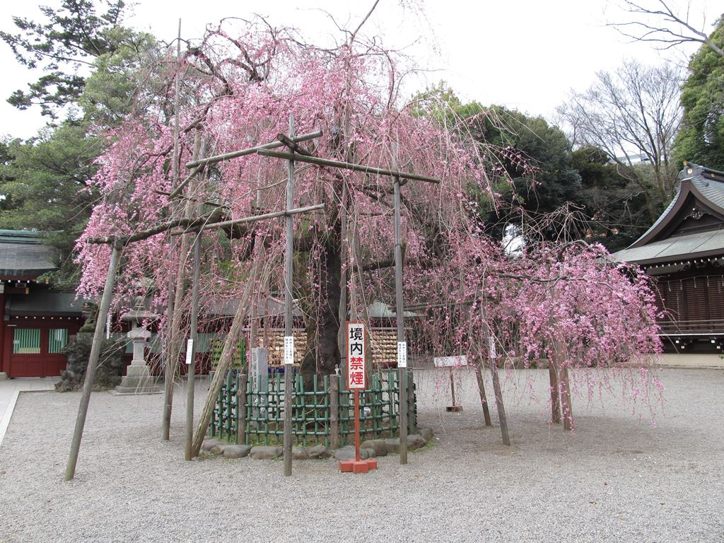 大國魂神社枝垂桜